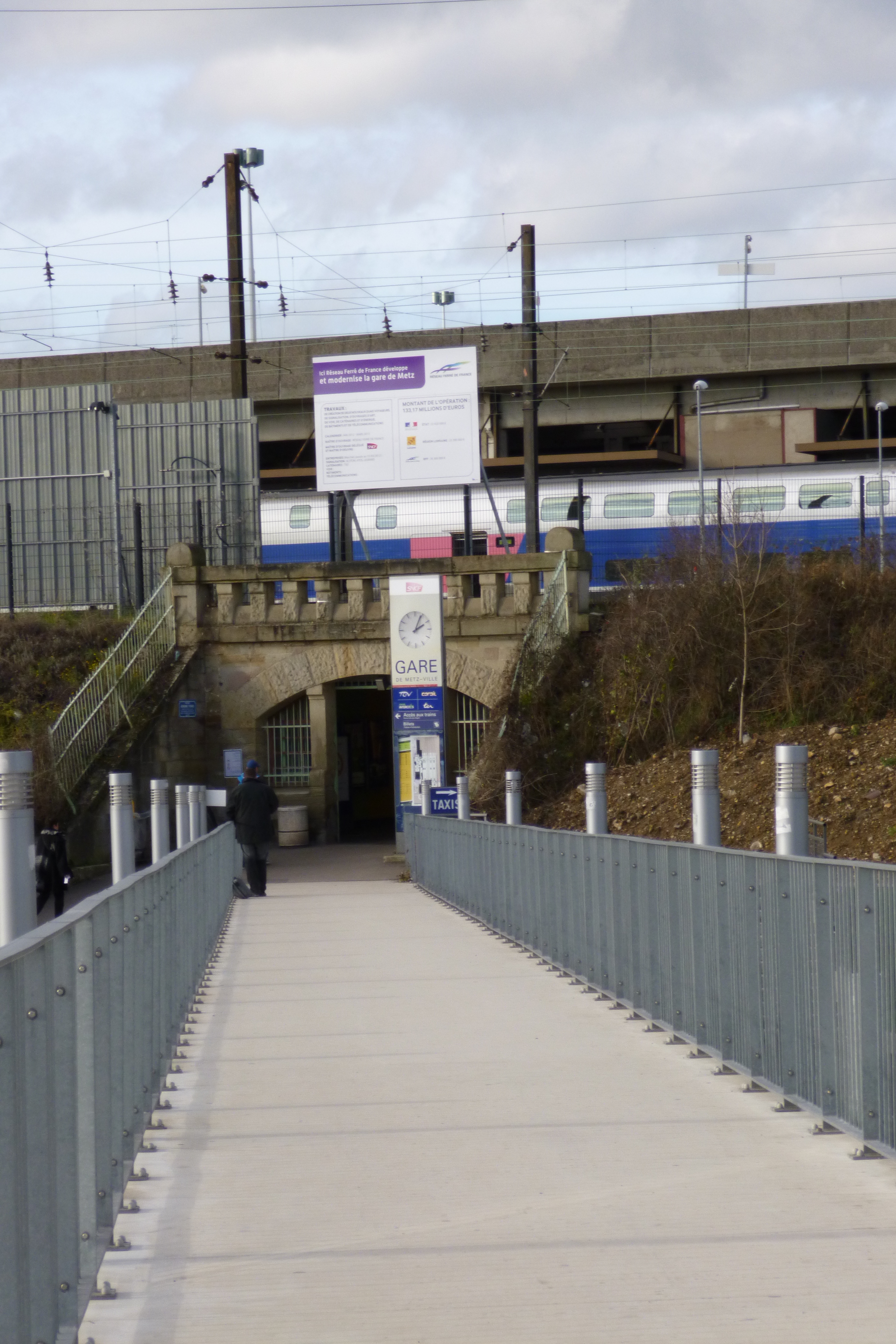 Sortie sud de la gare de Metz (passage Adrienne Thomas)